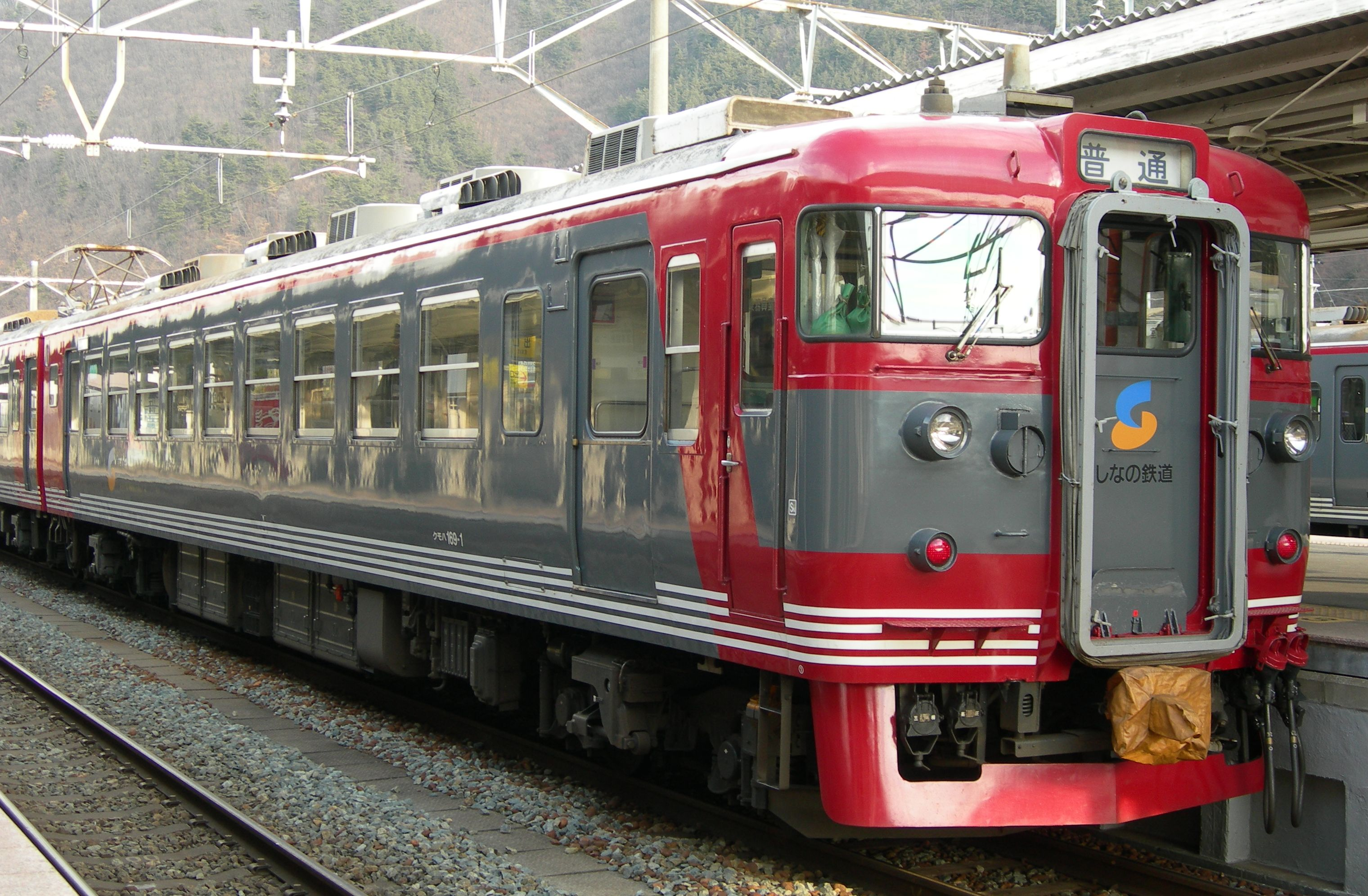 クモハ169-1